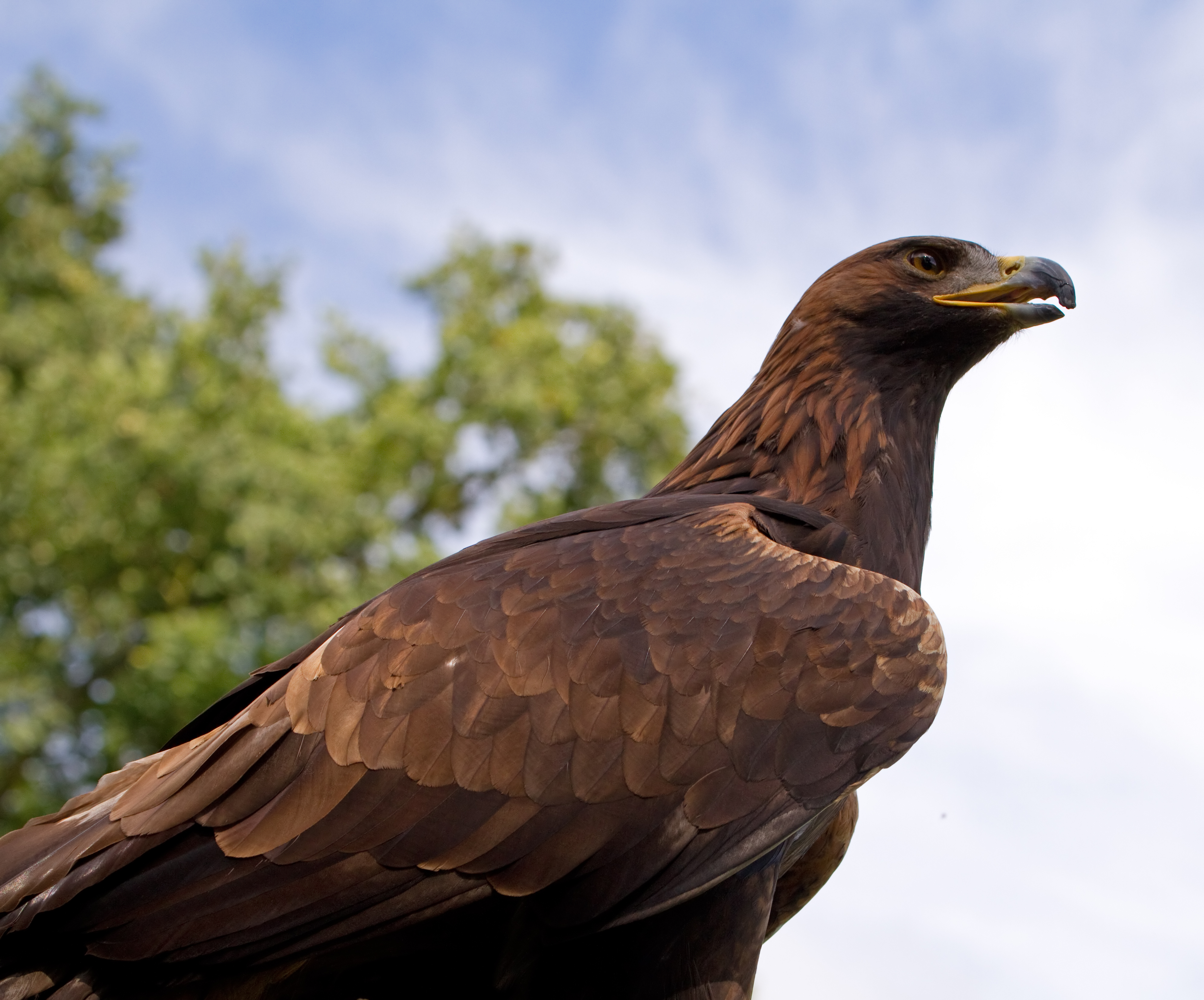 Golden Eagle 4a